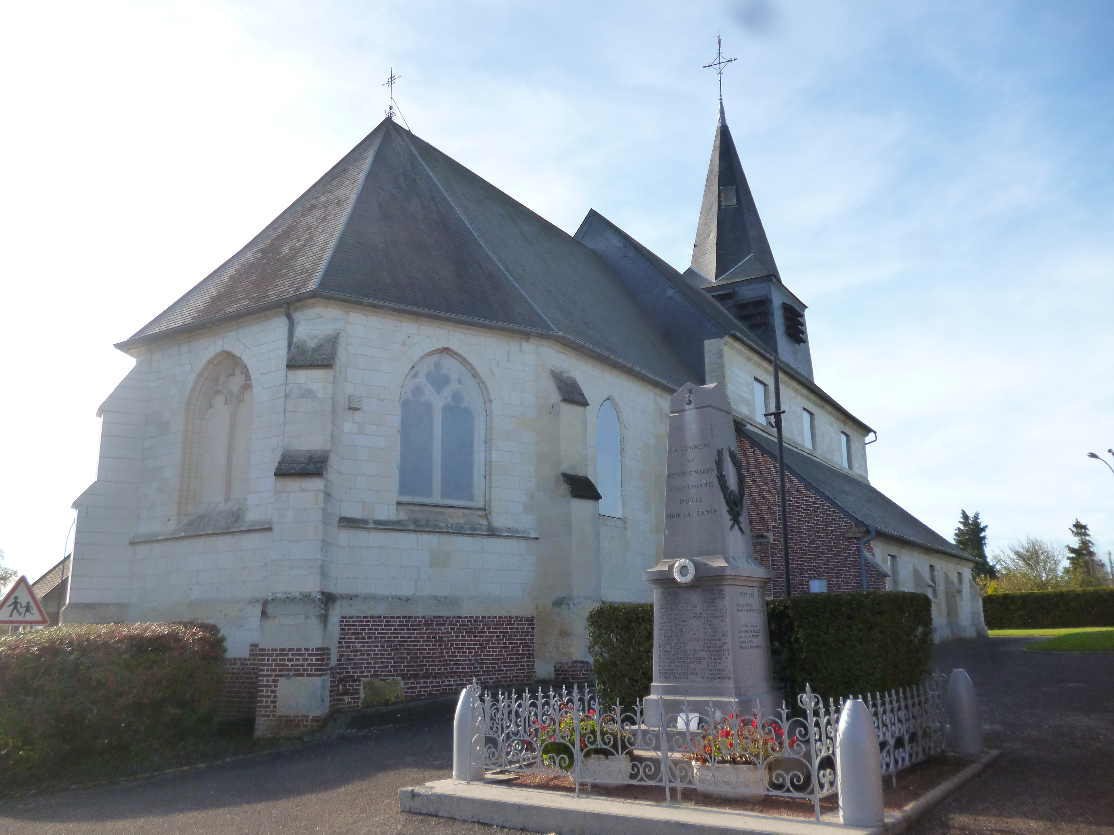 Eglise Saint-Martin et monument aux morts de la commune de Noyers-Saint-Martin (Oise).